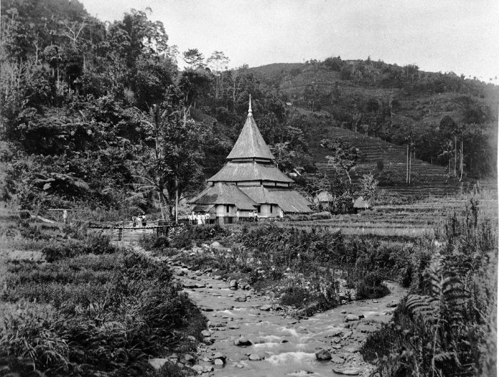 Foto. Landschap met moskee in Minangkabause bouwstijl te Kamp Taboe, Sumatra`s Westkust